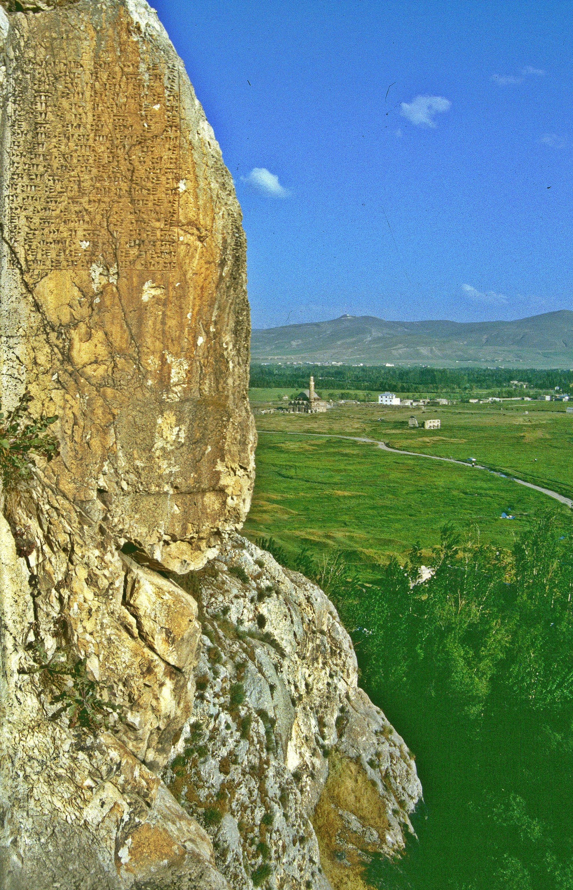 Tušpa, Annalen des Königs Argišti